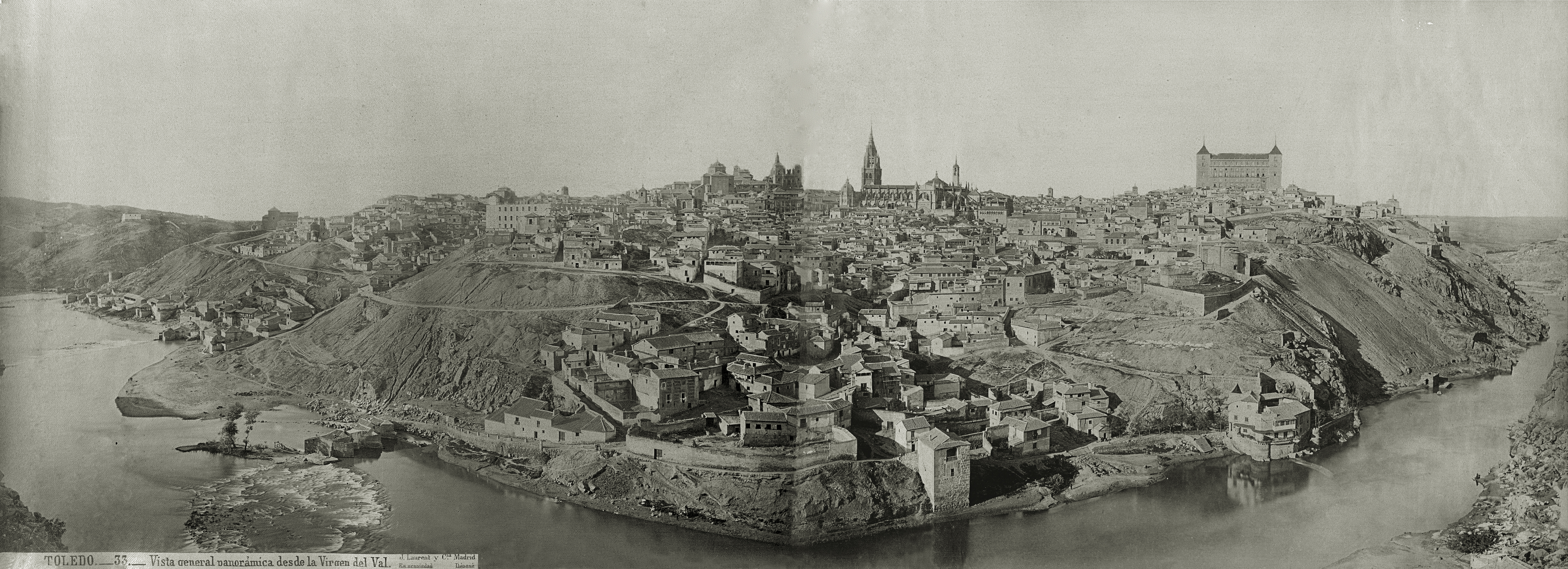 Foto de Juan Laurent